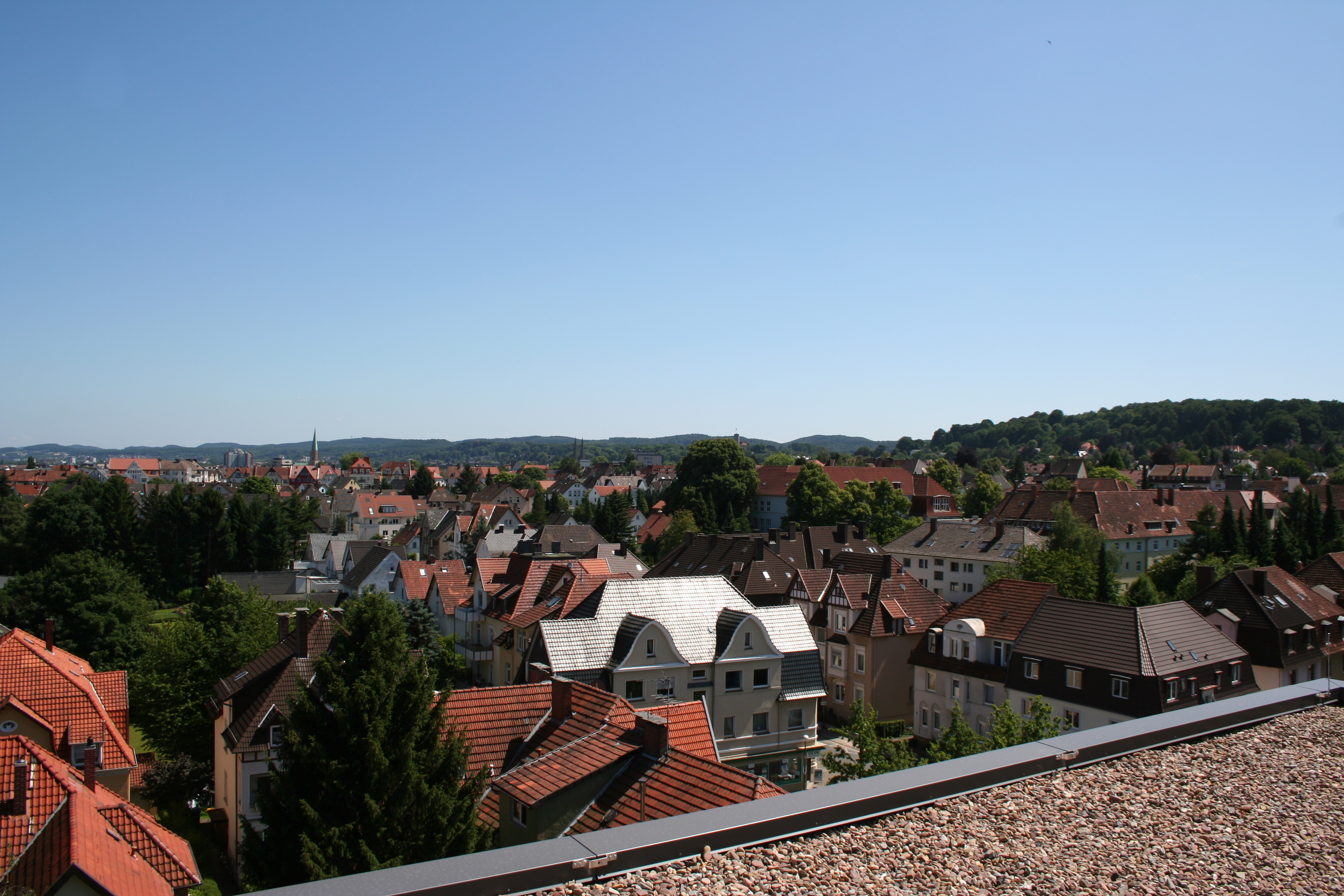 Der Bielefelder Westen vom Dach der neuen Tribüne der Bielefelder Alm aus gesehen.